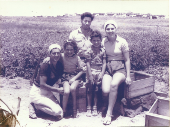 טובה גרשון כספין עם הוריה, אחיה וחברת ההורים בשדה ברמתיים